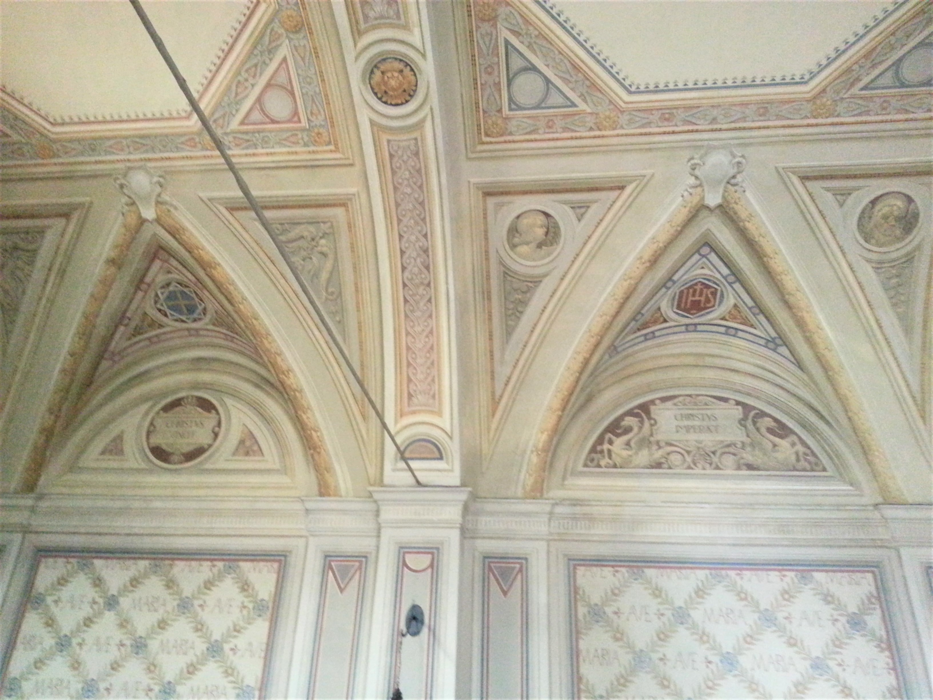 Particolare dell'interno della chiesa di san Gregorio magno Gromo